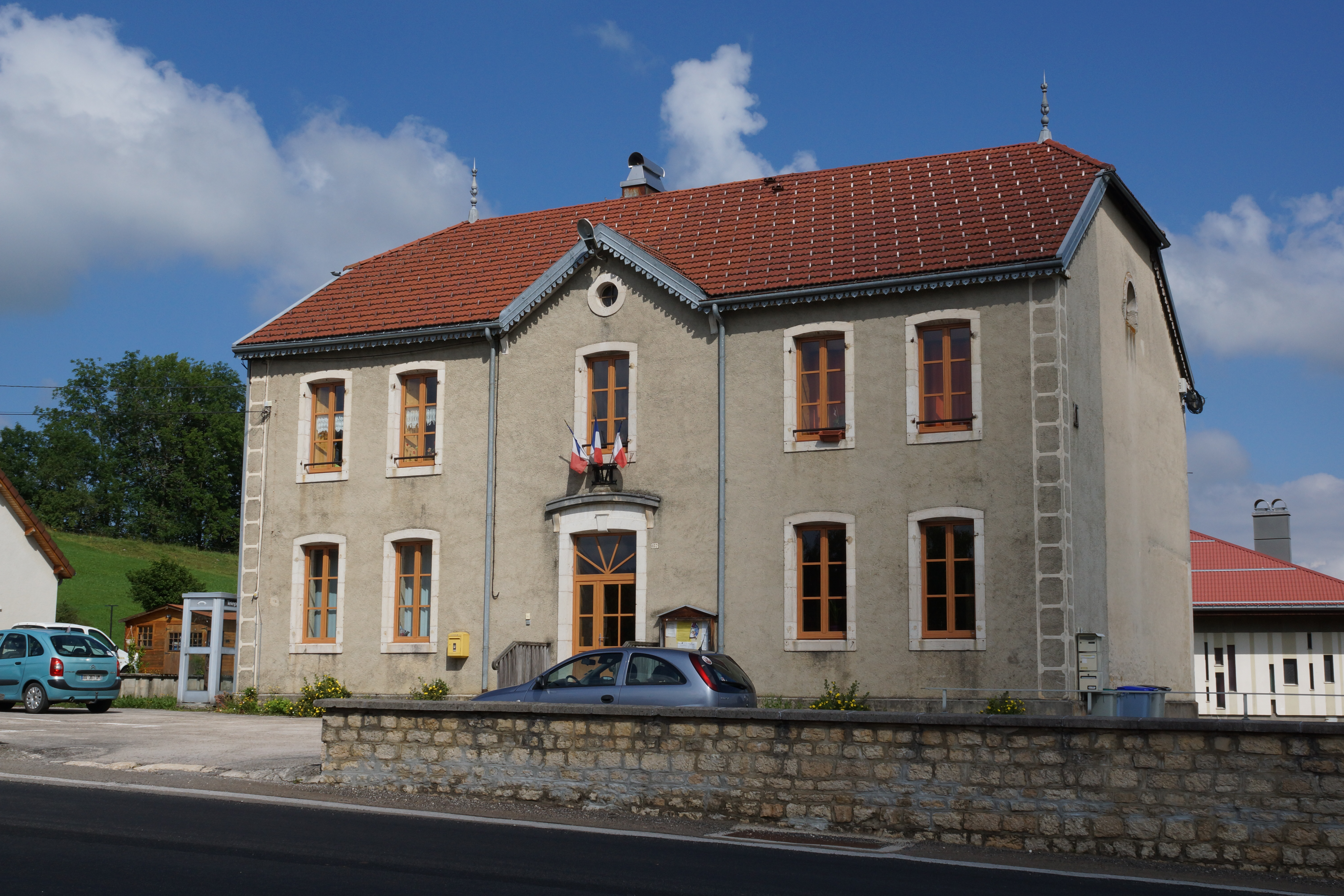 commune de Lac-des-Rouges-Truites, la mairie.